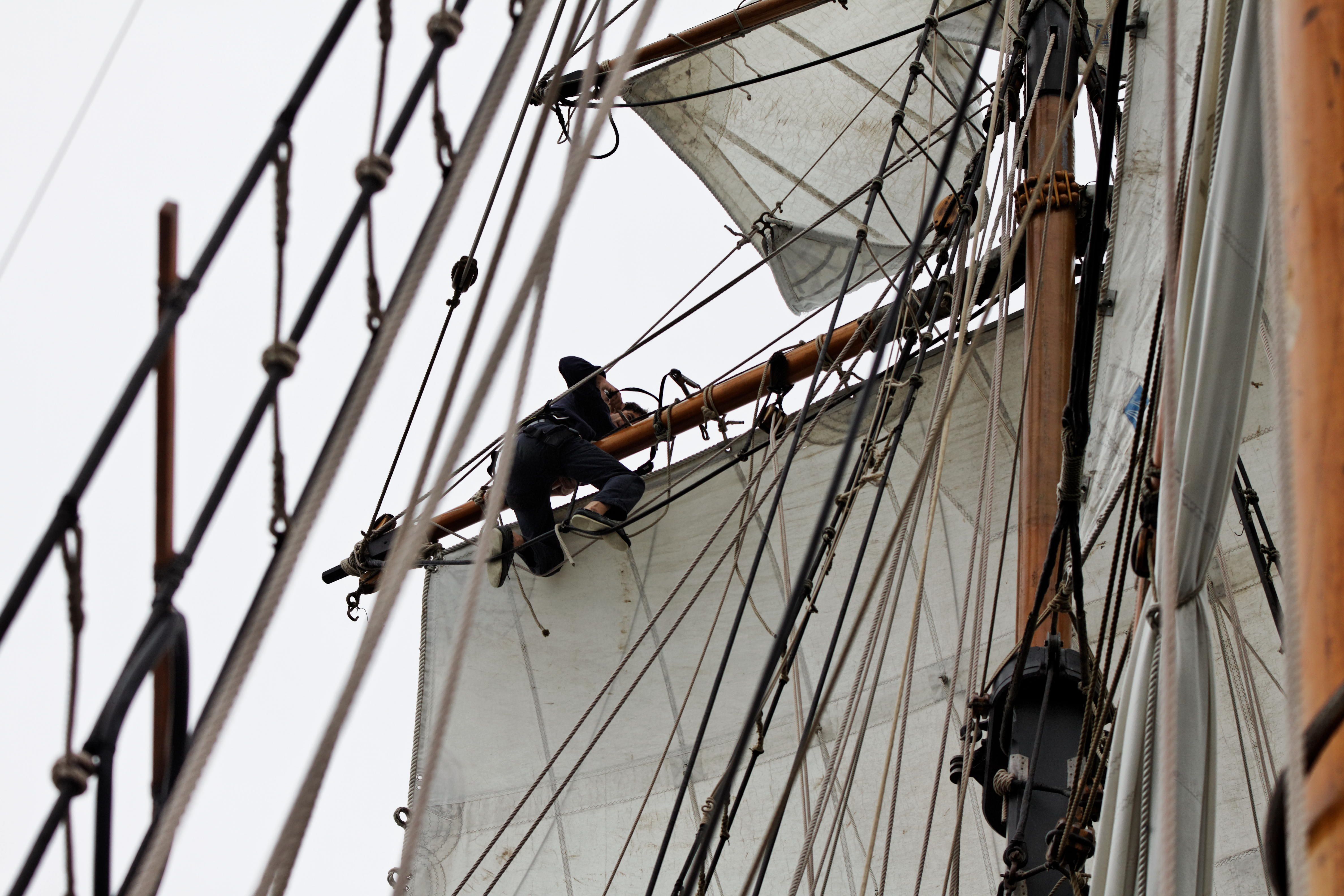 Le gabier de la Recouvrance lors des Tonnerres de Brest 2012.